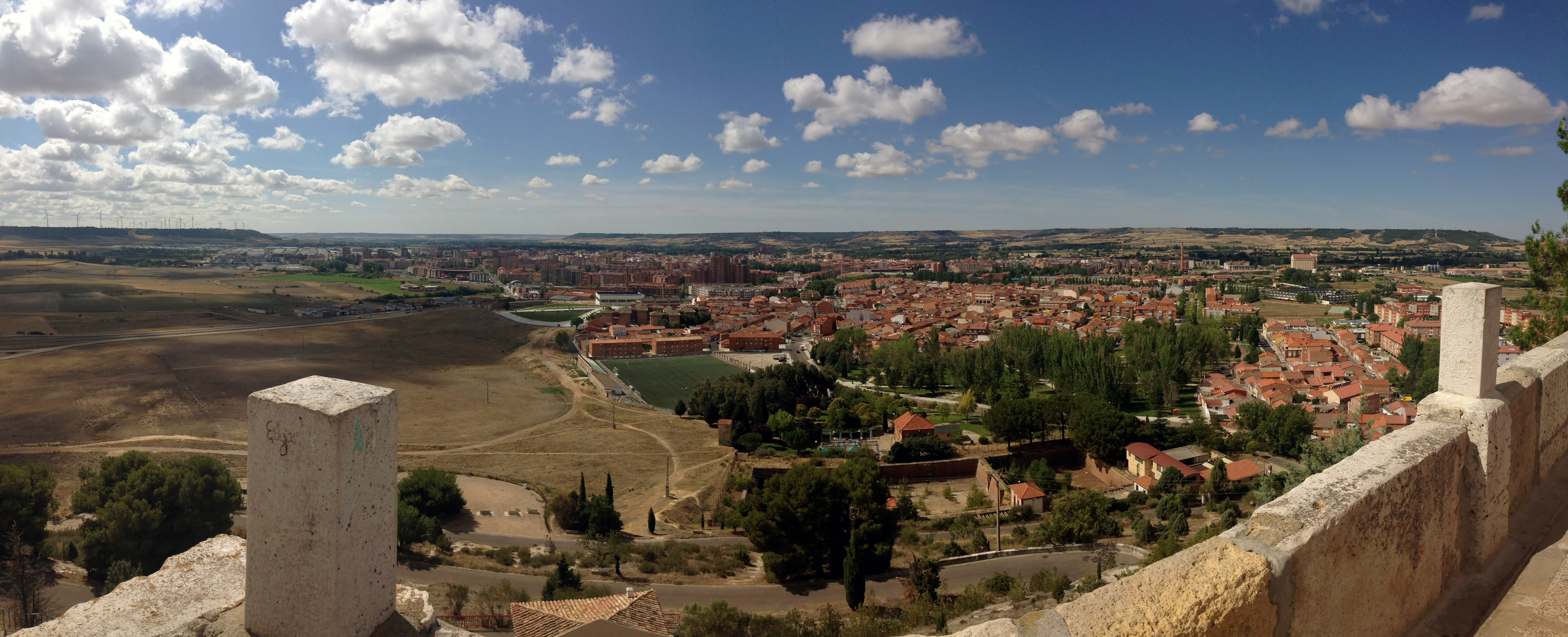 Palencia